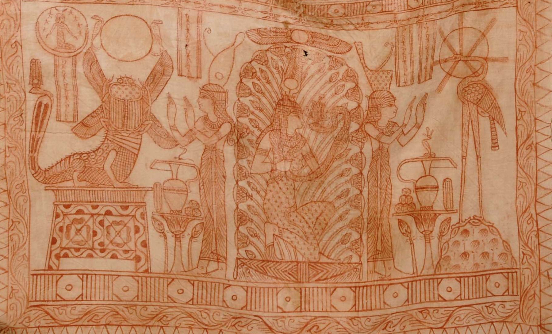 Registre inférieur de la Tunique de Saqqarah conservée au Musée du Caire et datant du IIIe siècle de notre ère